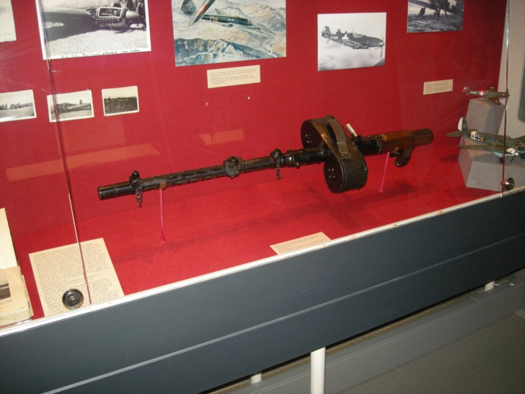 Maschinengewehr MG 15